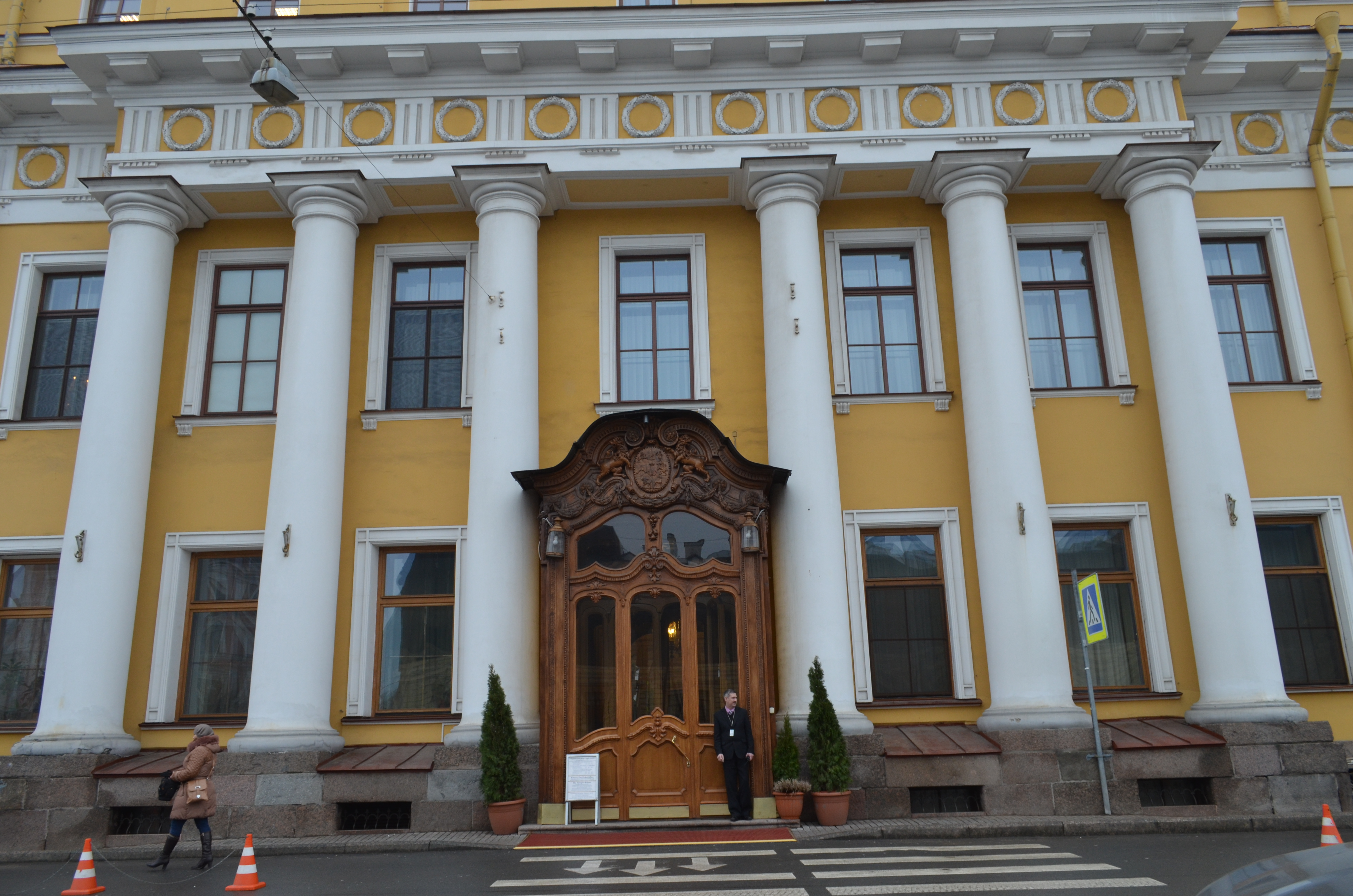 Дворец Юсуповых (Санкт-Петербург, Мойка, 94